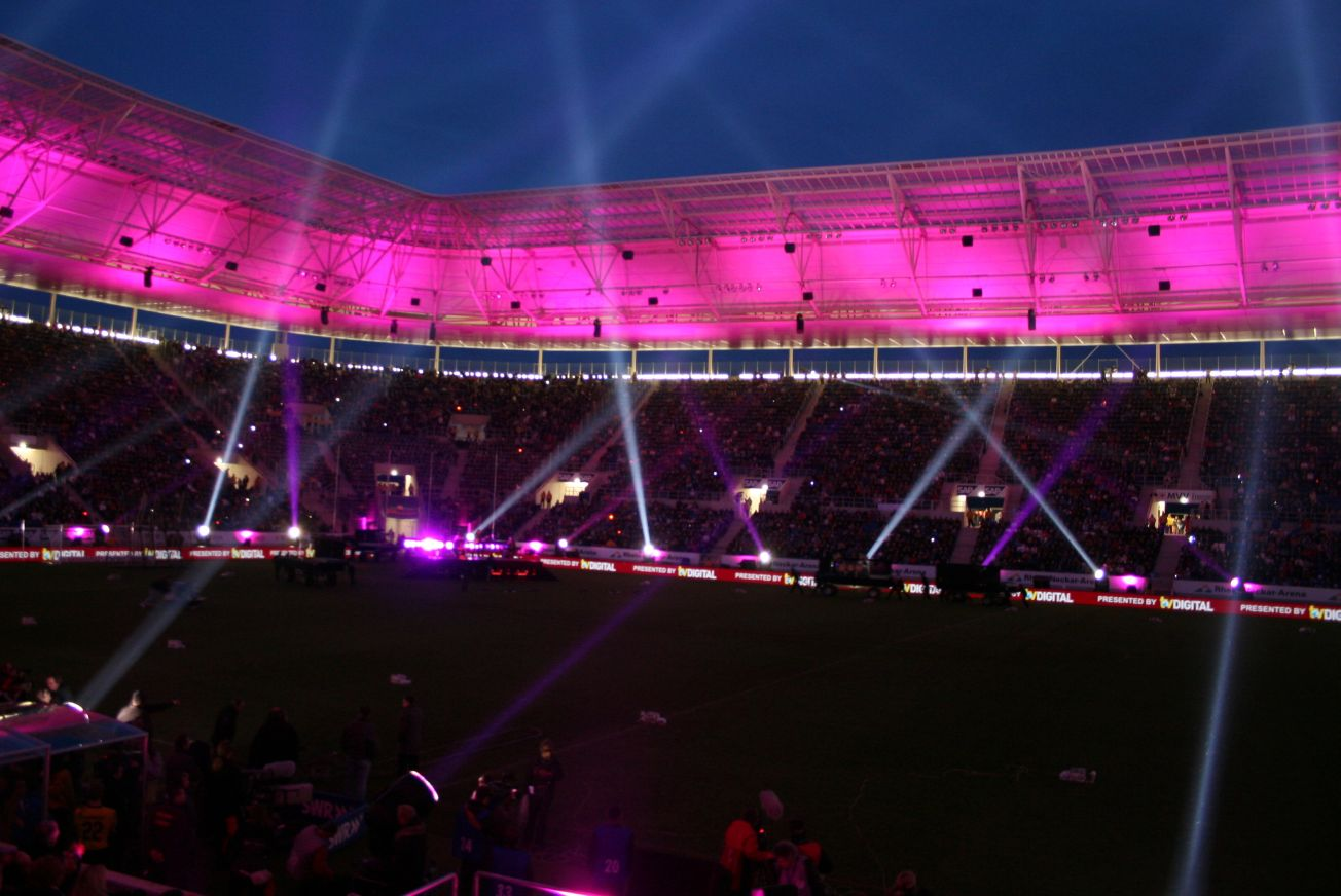 Eröffnungsfeier der Rhein-Neckar-Arena in Sinsheim im Januar 2009